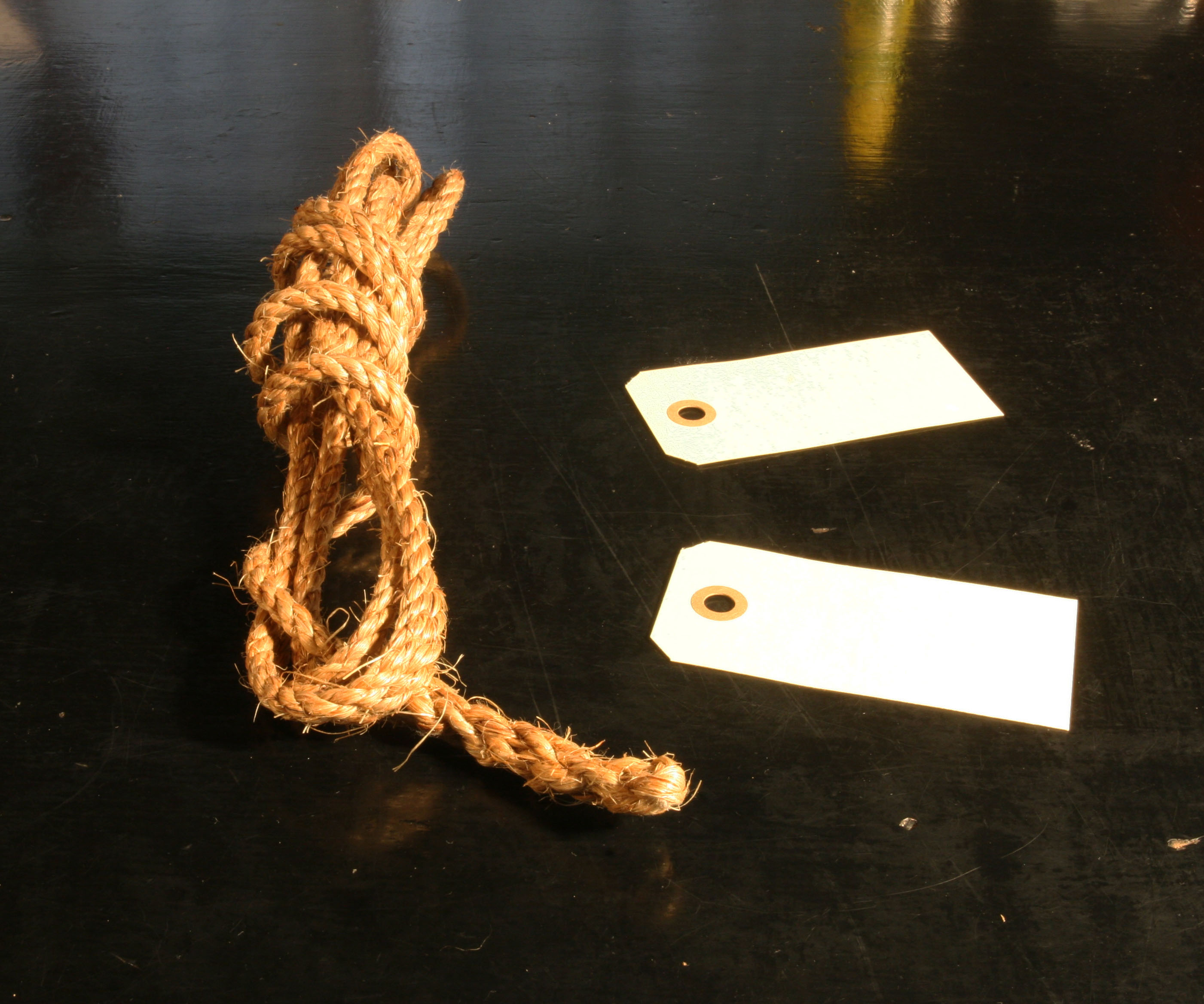 Manilaline og manilamærker